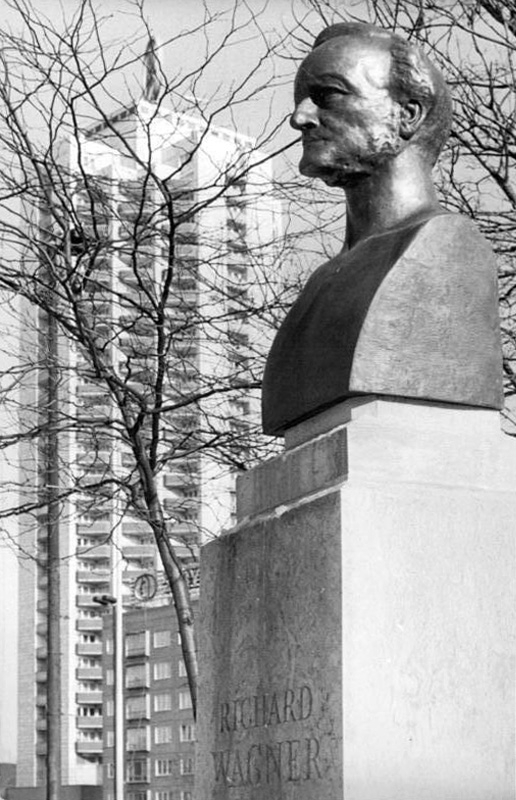 Leipzig, Richard-Wagner-Denkmal ADN-ZB Grubitzsch 7.2.1983 Leipzig: Richard-Wagner-Tage der DDR vom 7.-13.2.1983-Diese Bronzebüste Richard Wagners entstand nach einer Vorlage des Bildhauers Max Klinger und fand ihren Platz am Schwanenteich der Messestadt. 1904 wurde von der Gipsvorlage bereits eine Marmorbüste geschaffen, die im Leipziger Musikzimmer auf der Weltausstellung in St. Louis stand und 1912 in den Bestand des Wallraf-Richartz-Museums in Köln überging.